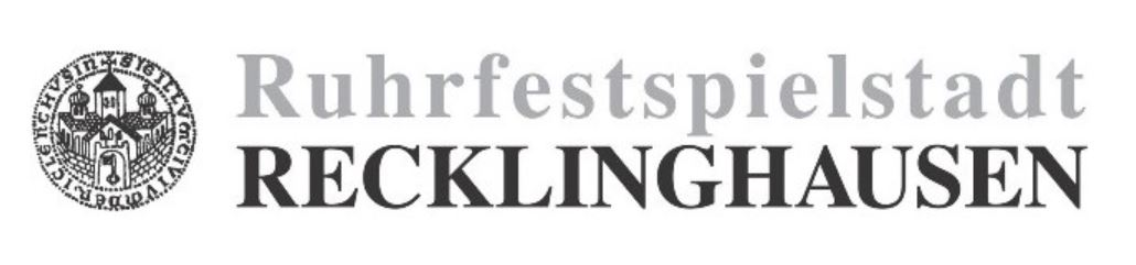 Stadtmarke der Stadt Recklinghausen